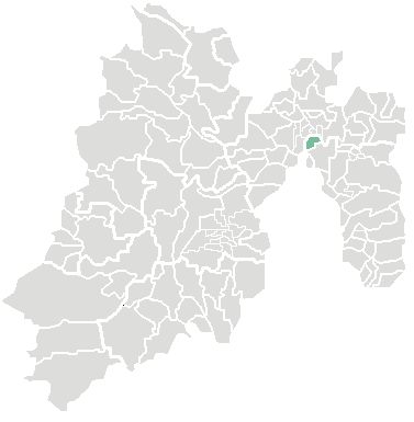 locatie van de gemeente Coacalco in Mexico (staat)